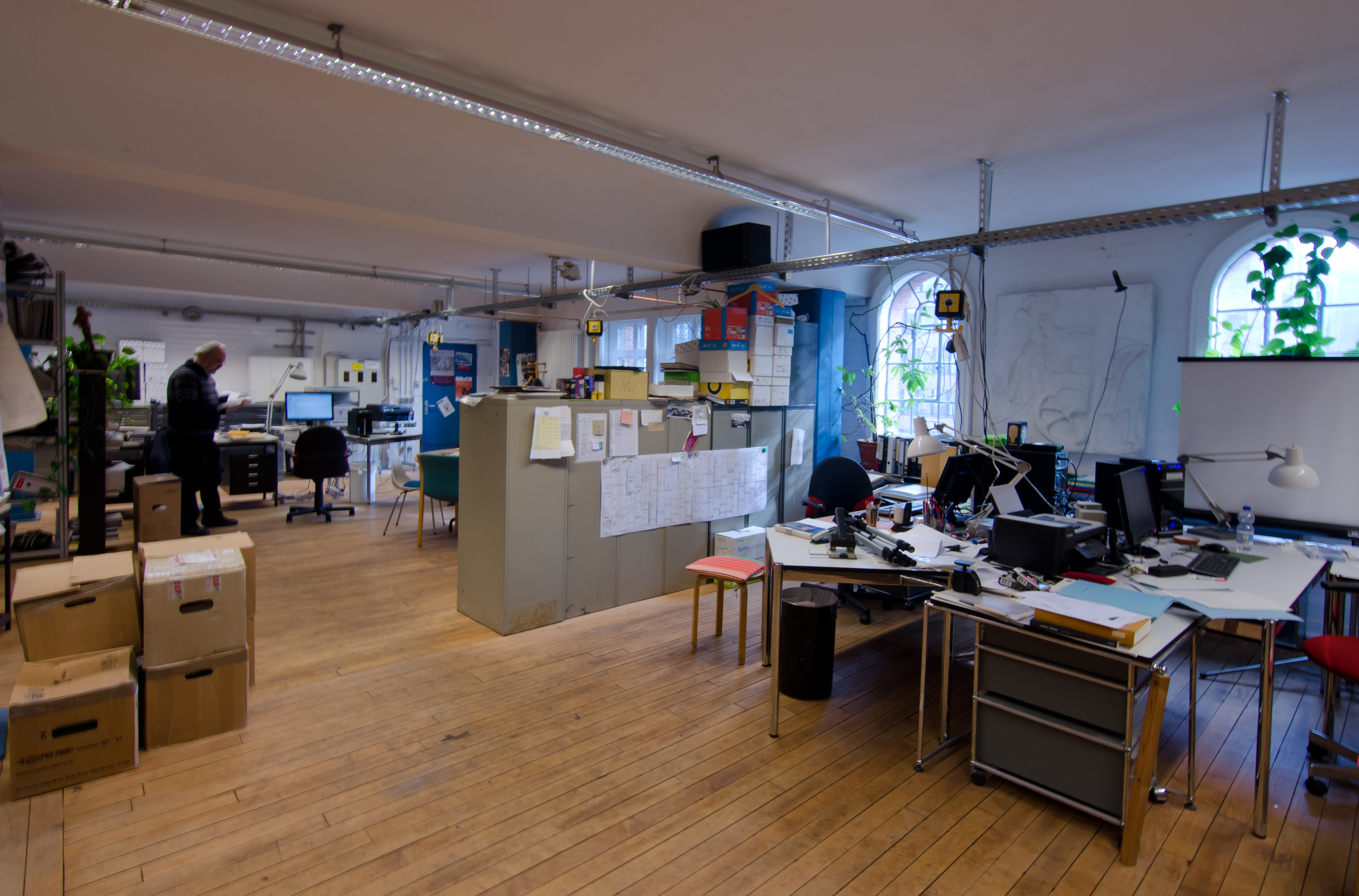 Hamburgisches Architekturarchiv